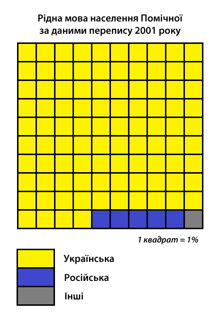 Інфографіка розподілу населення міста Помічна Добровеличківського району за рідною мовою згідно з даними перепису 2001 року. Джерело: Розподіл населення Кіровоградської області за рідною мовою (у % до загальної чисельності населення) за переписом 2001 року